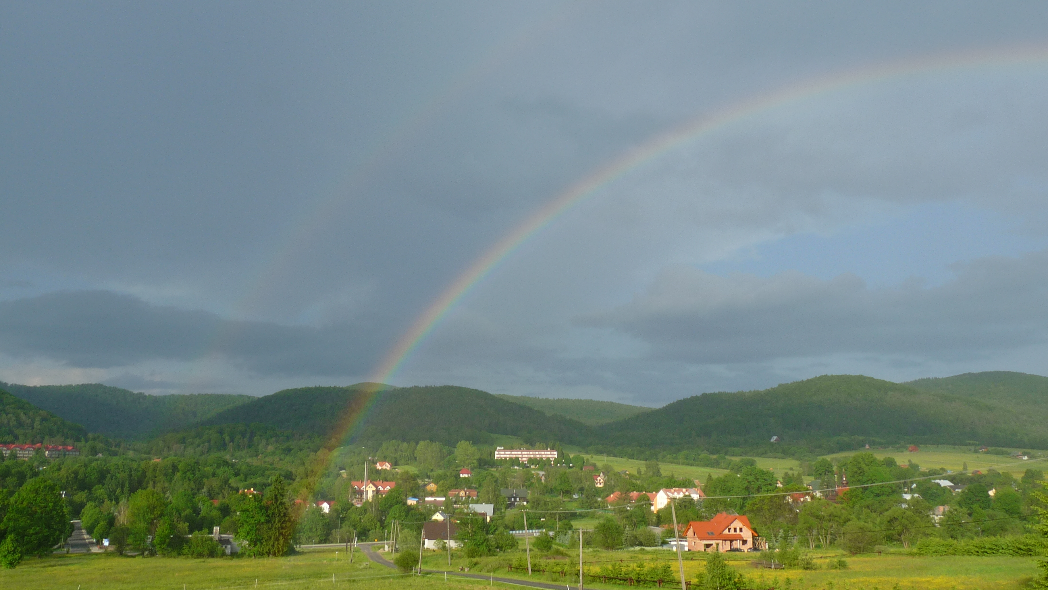 Beskid Sądecki 4